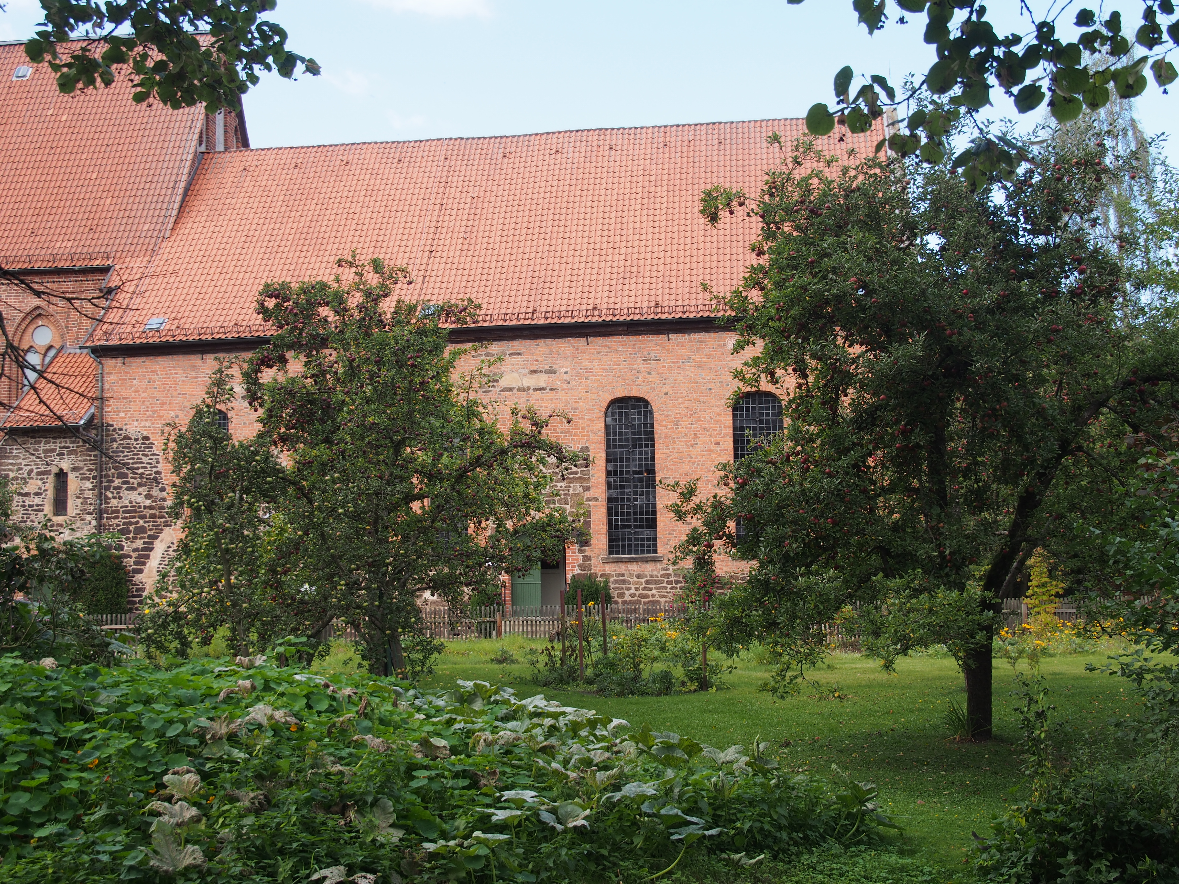 Südseite der St. Marien-Kirche Wienhausen